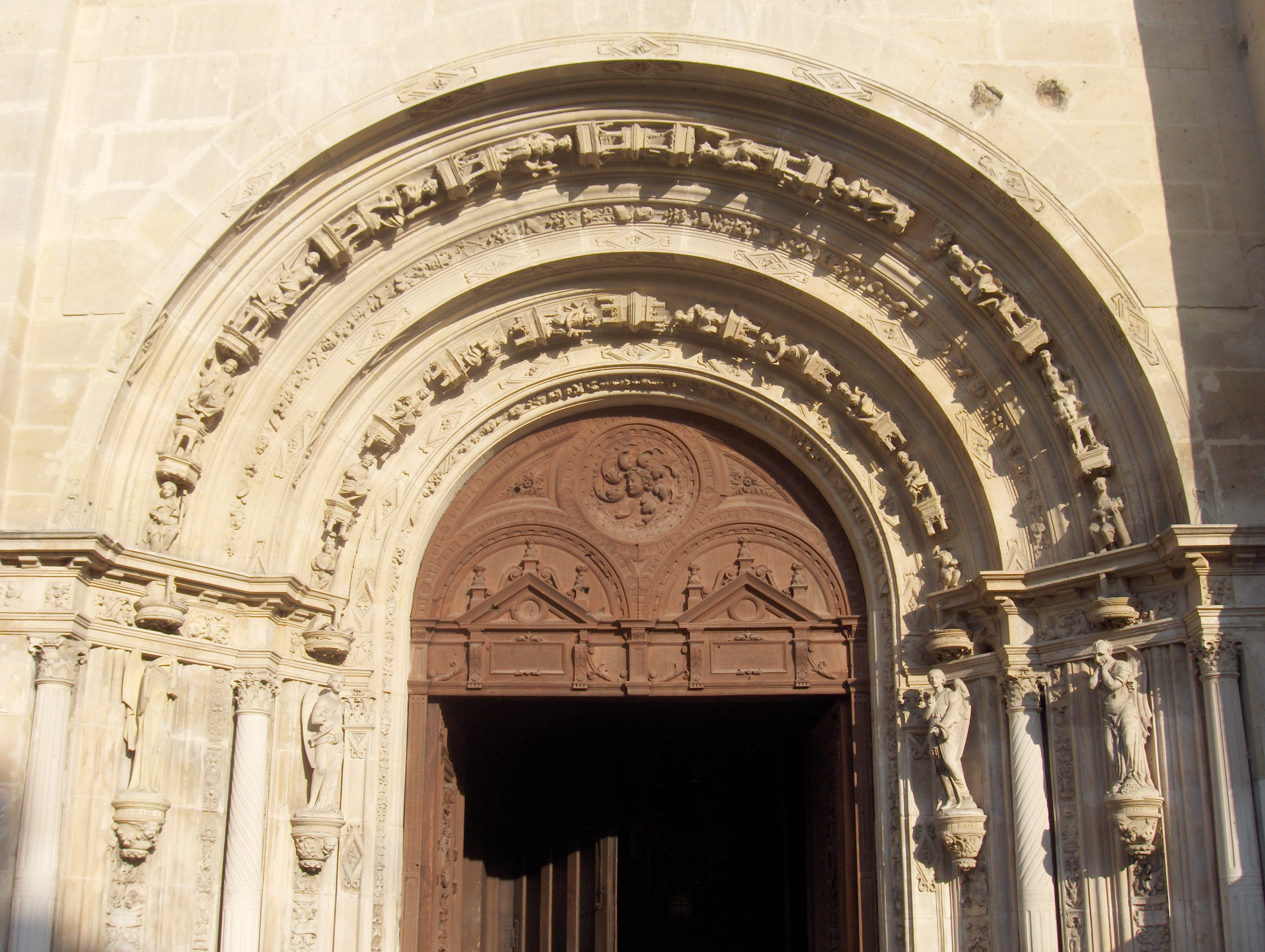 Portail de l'église saint-Martin à L'Isle-Adam (Val-d'Oise) .